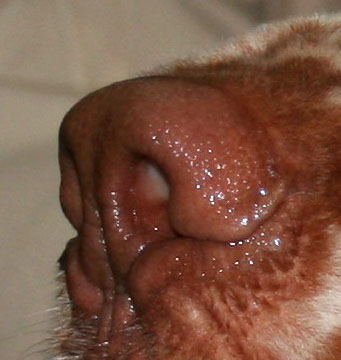 Clumber_spaniel - trufla